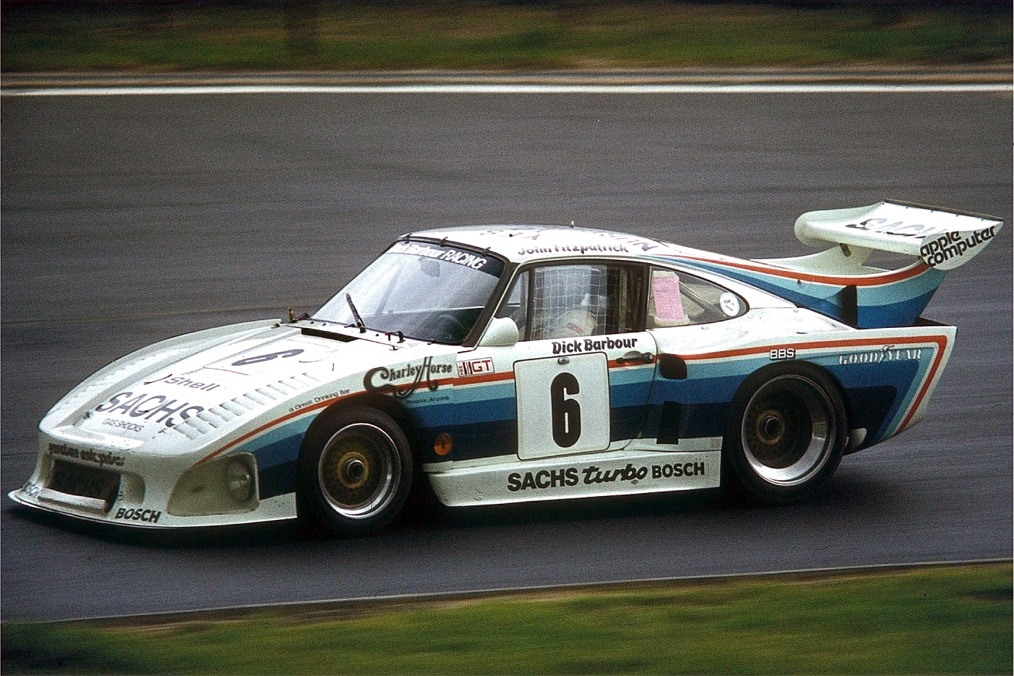 Porsche 935 von Fitzpatrick, Barbour, Plankenhorn beim Training zum Training 1000-km-Rennen Nürburgring. Der Wagen belegte den 2. Platz hinter Stommelen/Barth in 5:52:56,0 Stunden für 1004,52 km (170,77 km/h).